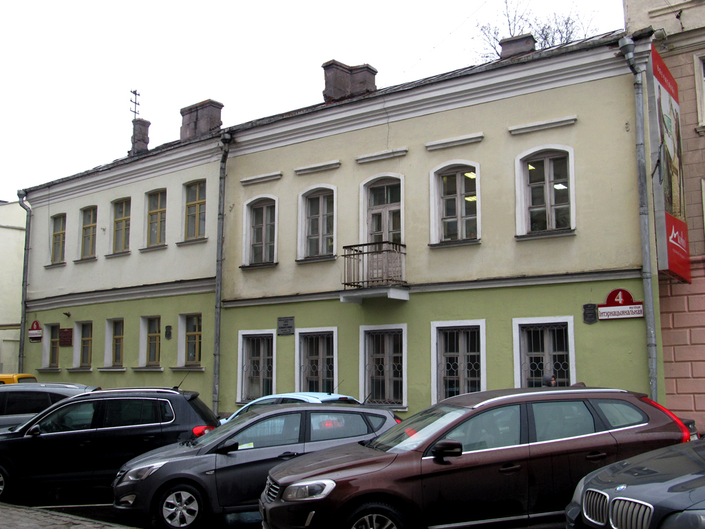 Мінск. Вуліца Інтэрнацыянальная, 4, 6